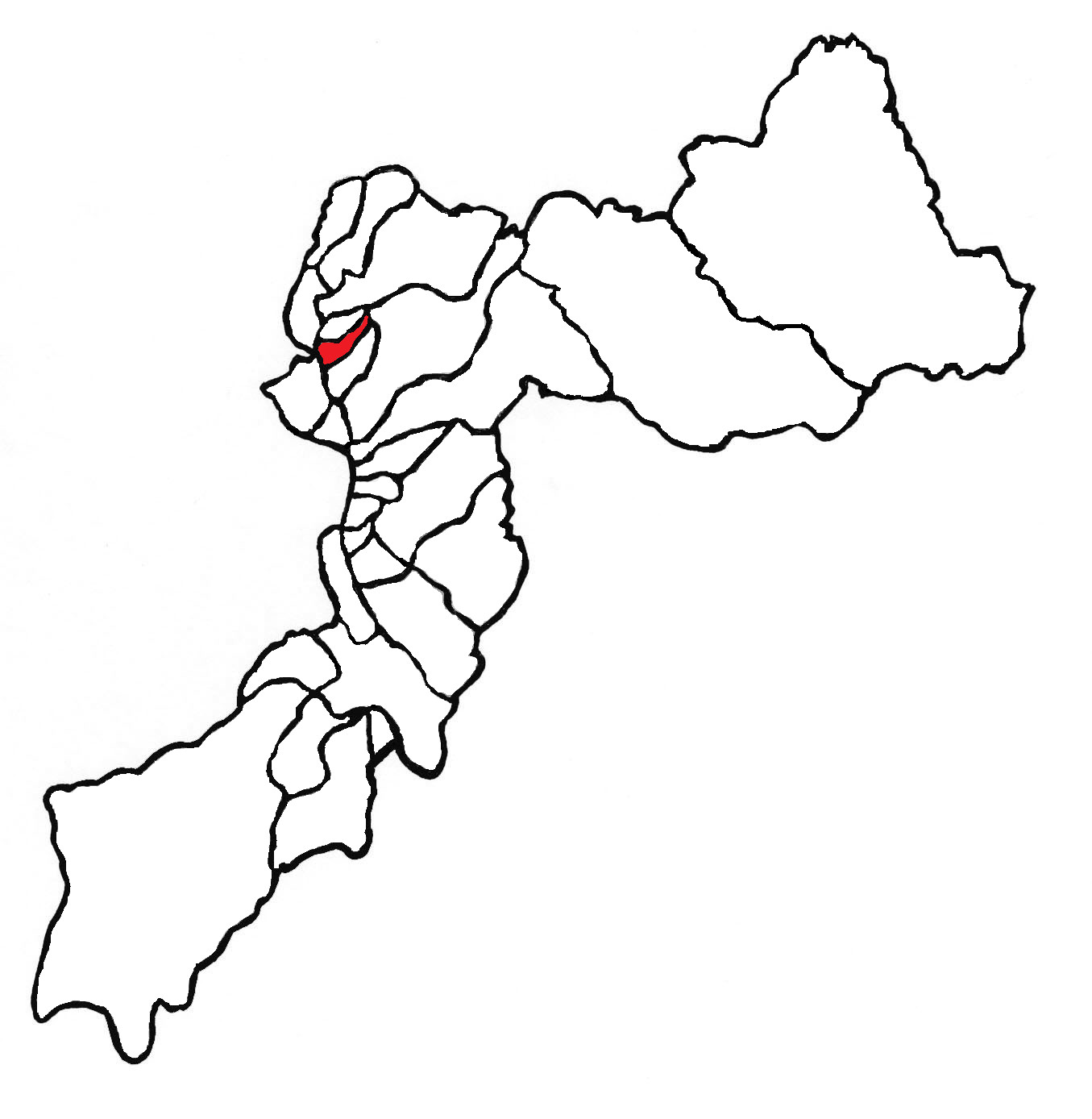 Ubicación del distrito en la provincia de Huancayo, departamento de Junín, Perú